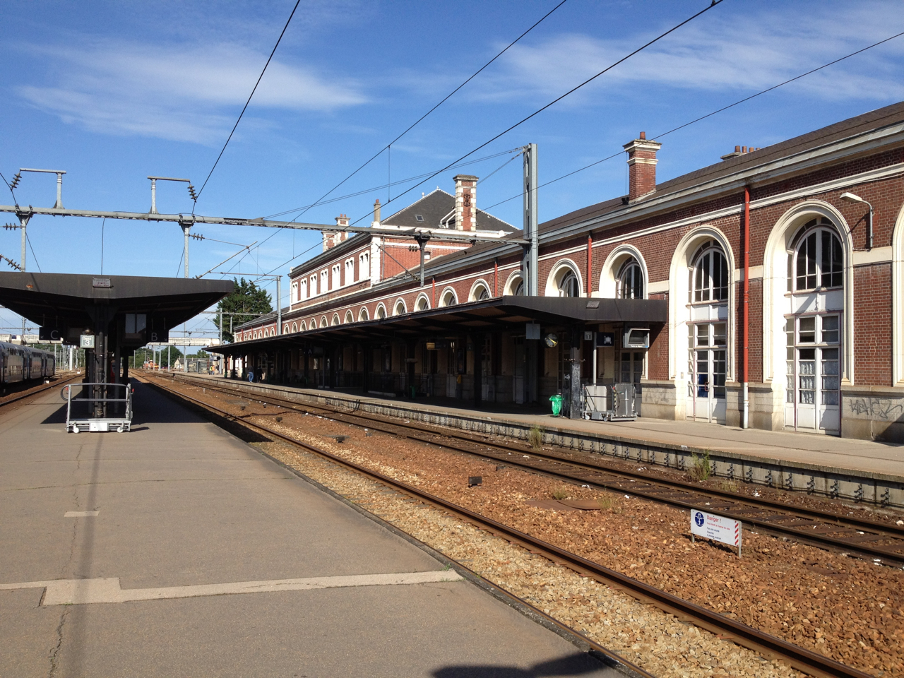 Bâtiment voyageurs de la gare d'Évreux-Normandie, département de l'Eure, Haute-Normandie, France